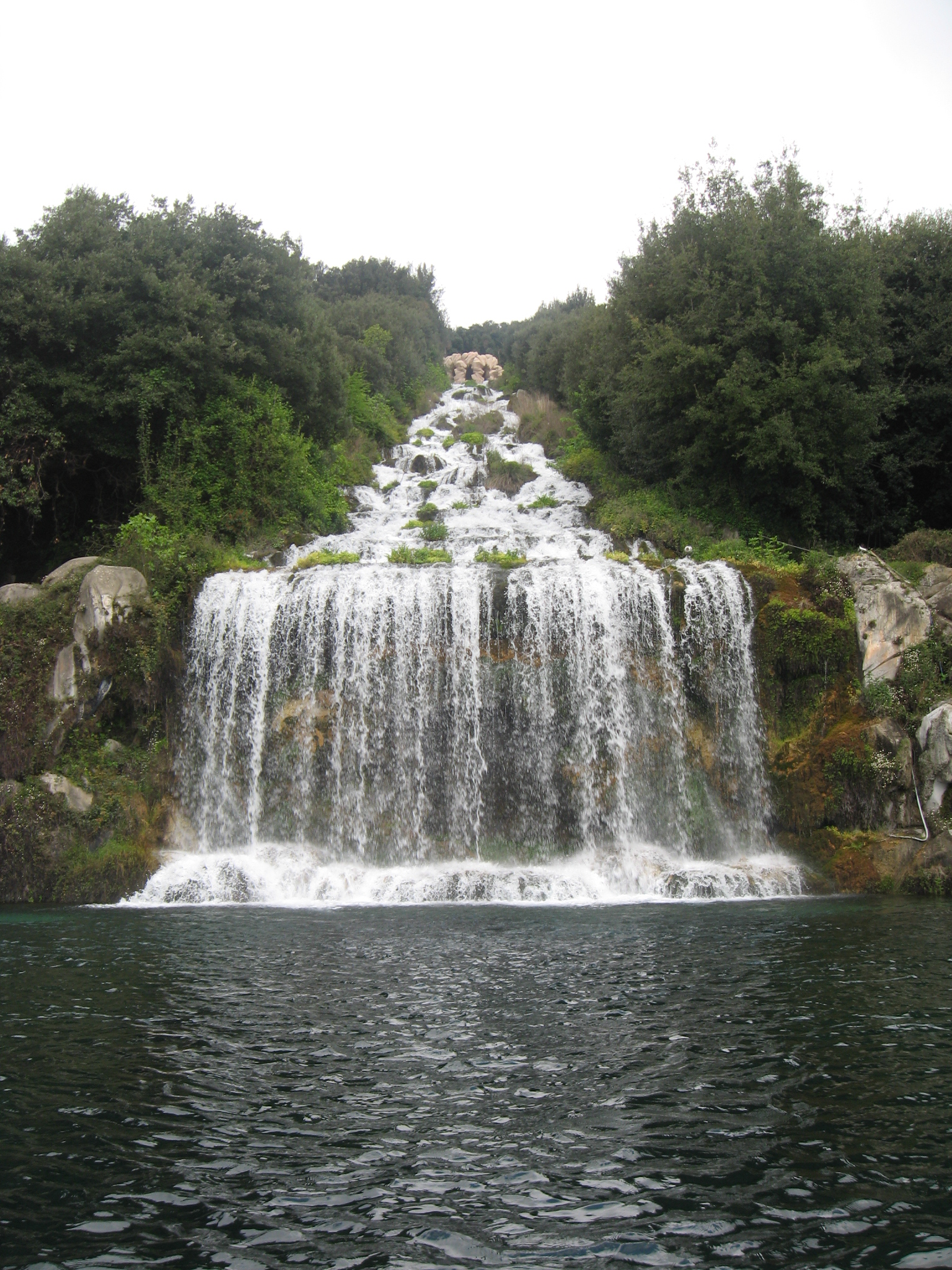 Vízesés